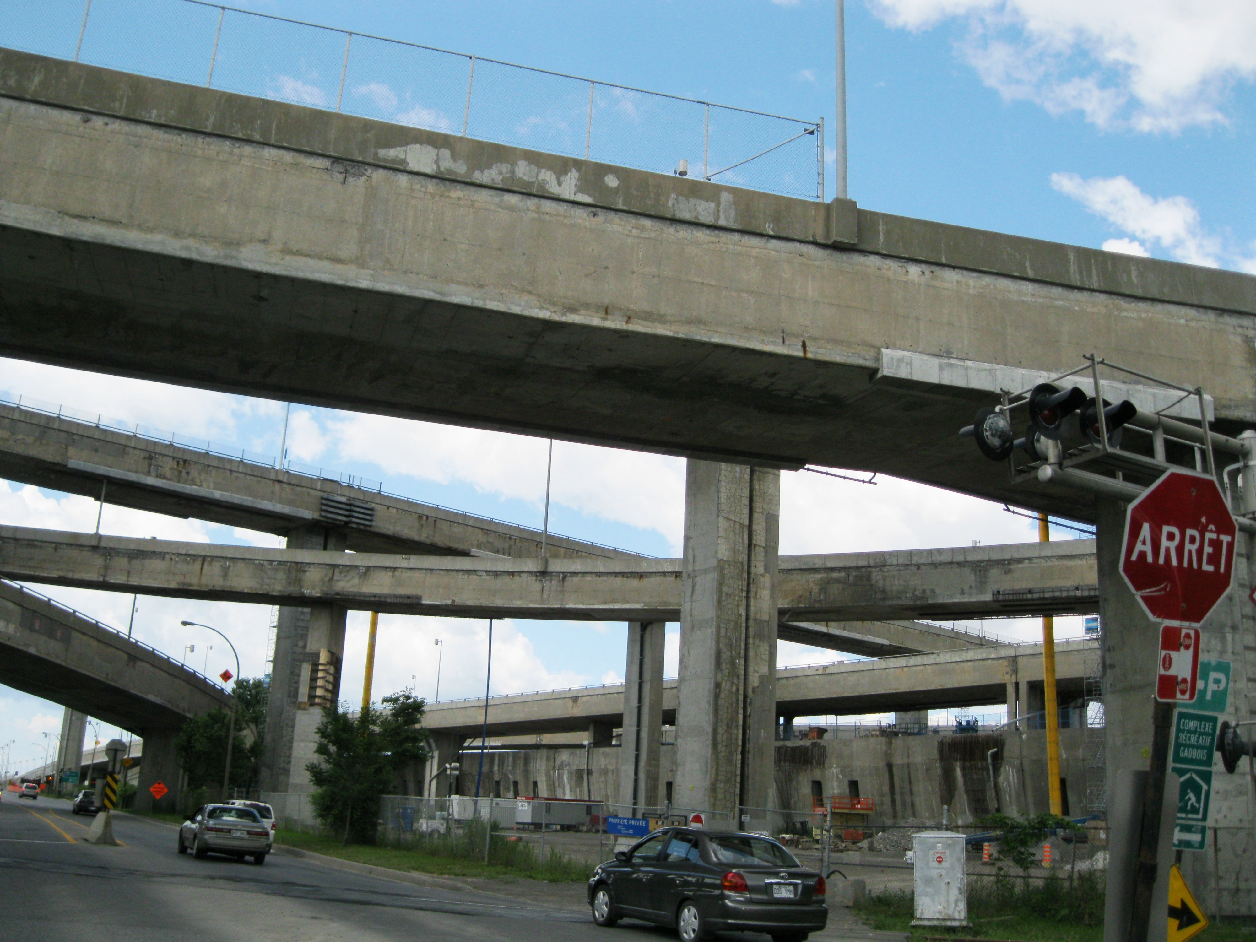 Bretelles s'entrecroisant dans l'échangeur Turcot